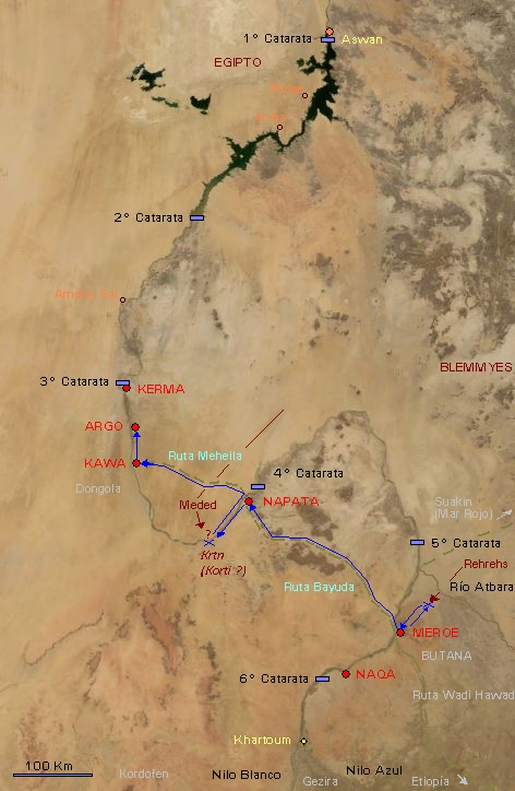 Kush, campaña de Aman-nete-yerike